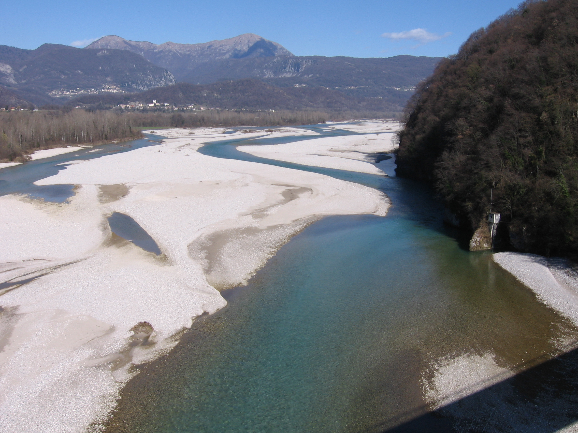 Le Tagliamento, vu du pont di Pinzano al Tagliamento (PN)